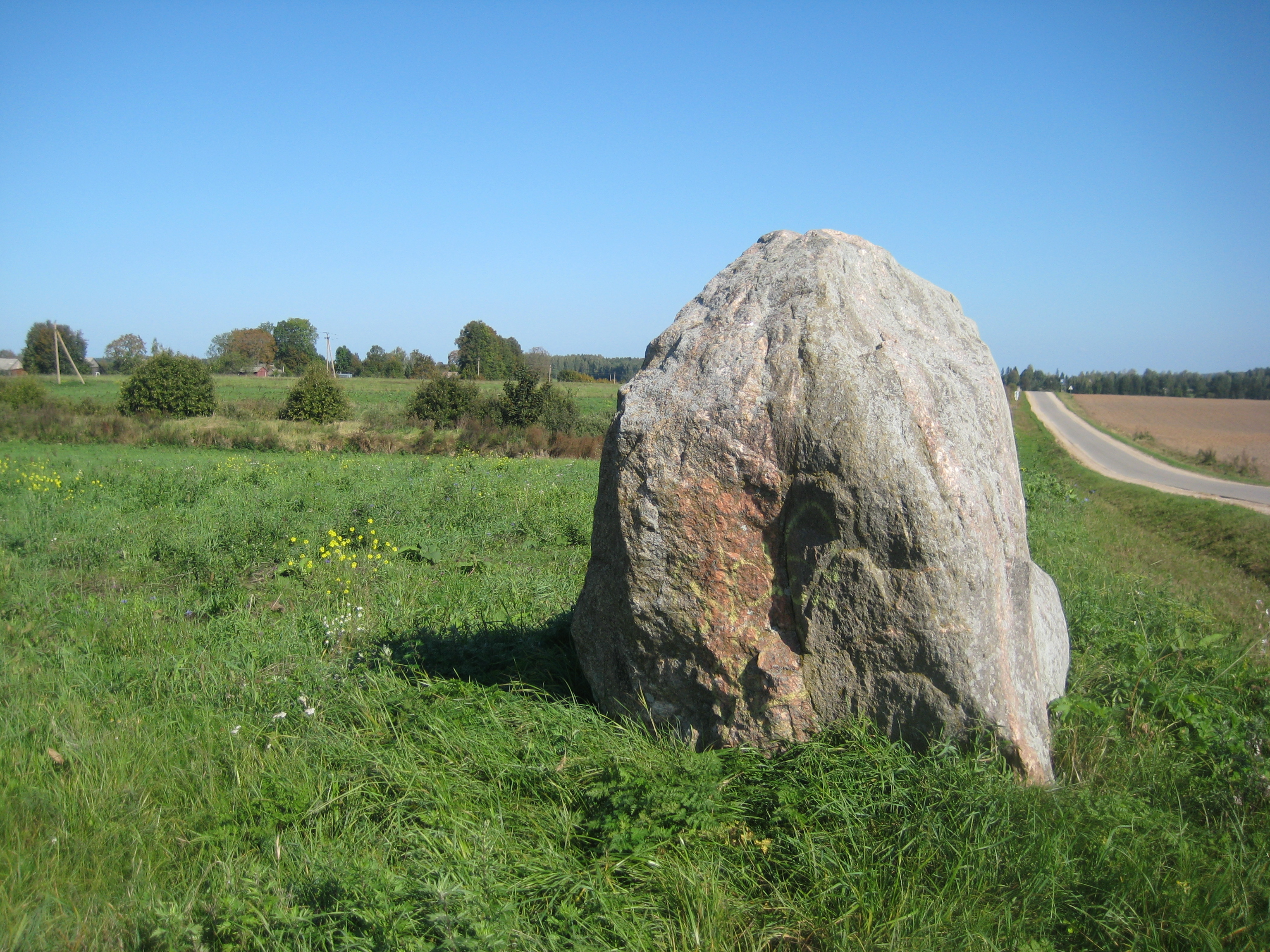 Dusetų sen., Lithuania